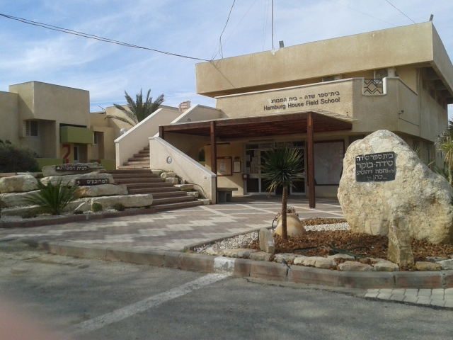 בית ספר שדה "שדה בוקר"